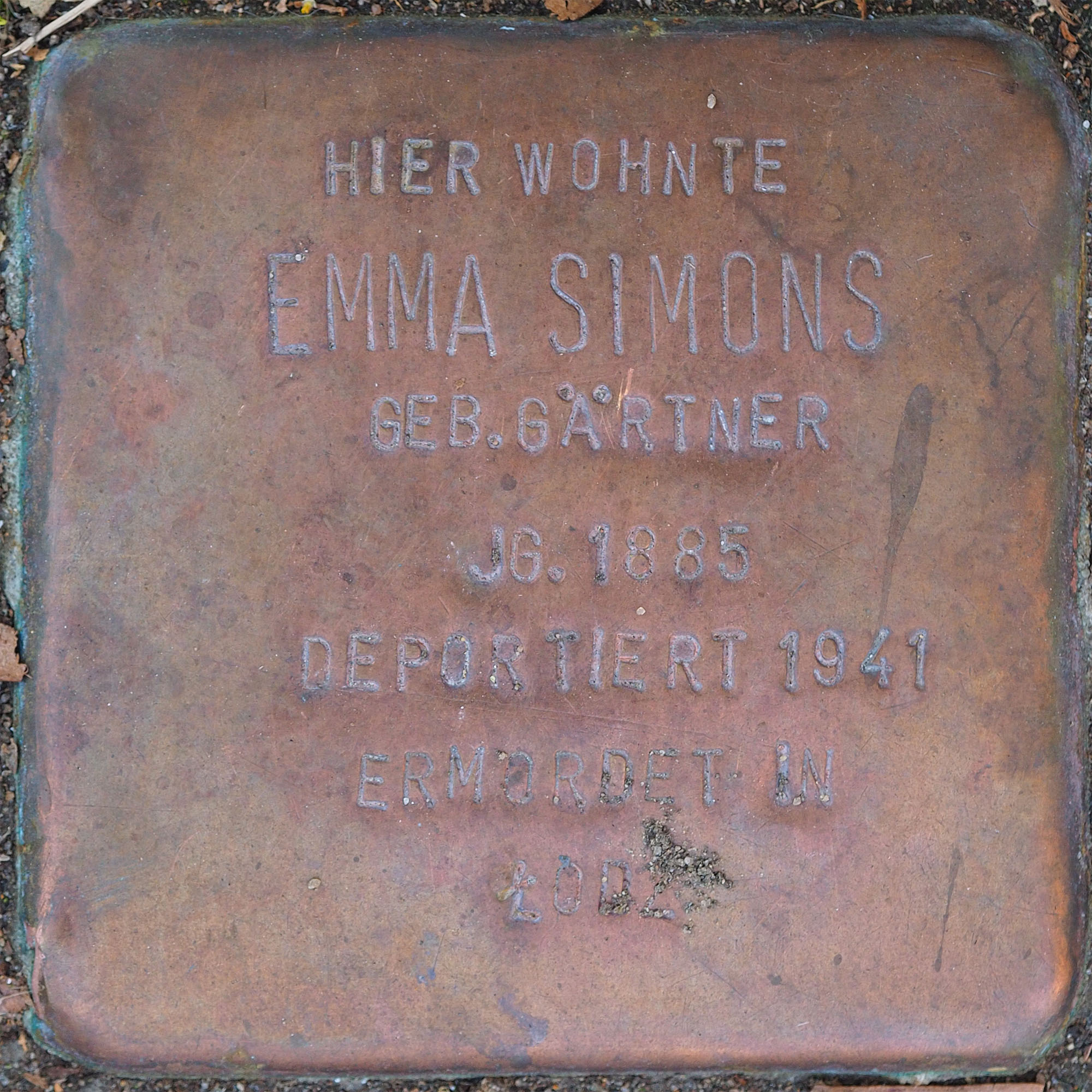 Stolperstein VIE: Simons, Emma